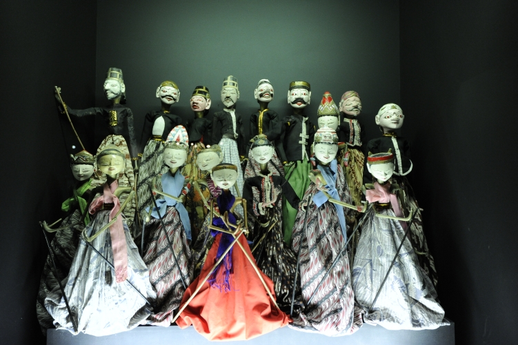 Wayang Golek e Wayang Klitik As marionetas de teatro Golek e do Klitik são de madeira, com uma dimensão que raramente excede ao 60cm. No caso das primeiras, a cabeça, com os pormenores do rosto entalhados e sublinhados a cor, encontra-se fixada a um suporte de madeira que atravessa o corpo e termina em ponta afiada, muitas vezes reforçada e revestida a metal para facilitar a sua fixação. A manipulação deste suporte permite rodar a cabeça das marionetas, movimentos que são acompanhados pelo dos braços e mãos. Os braços ligam-se ao corpo da marioneta, mantendo a sua mobilidade ao nível dos ombros, dos cotovelos e das mãos. O movimento dos braços e mãos é possível graças a finas hastes em madeira, ou, mais raramente, de chifre de búfalo, fixadas às mãos. O marionetista pode assim articular os movimentos da cabeça com os dos braços e das mãos.